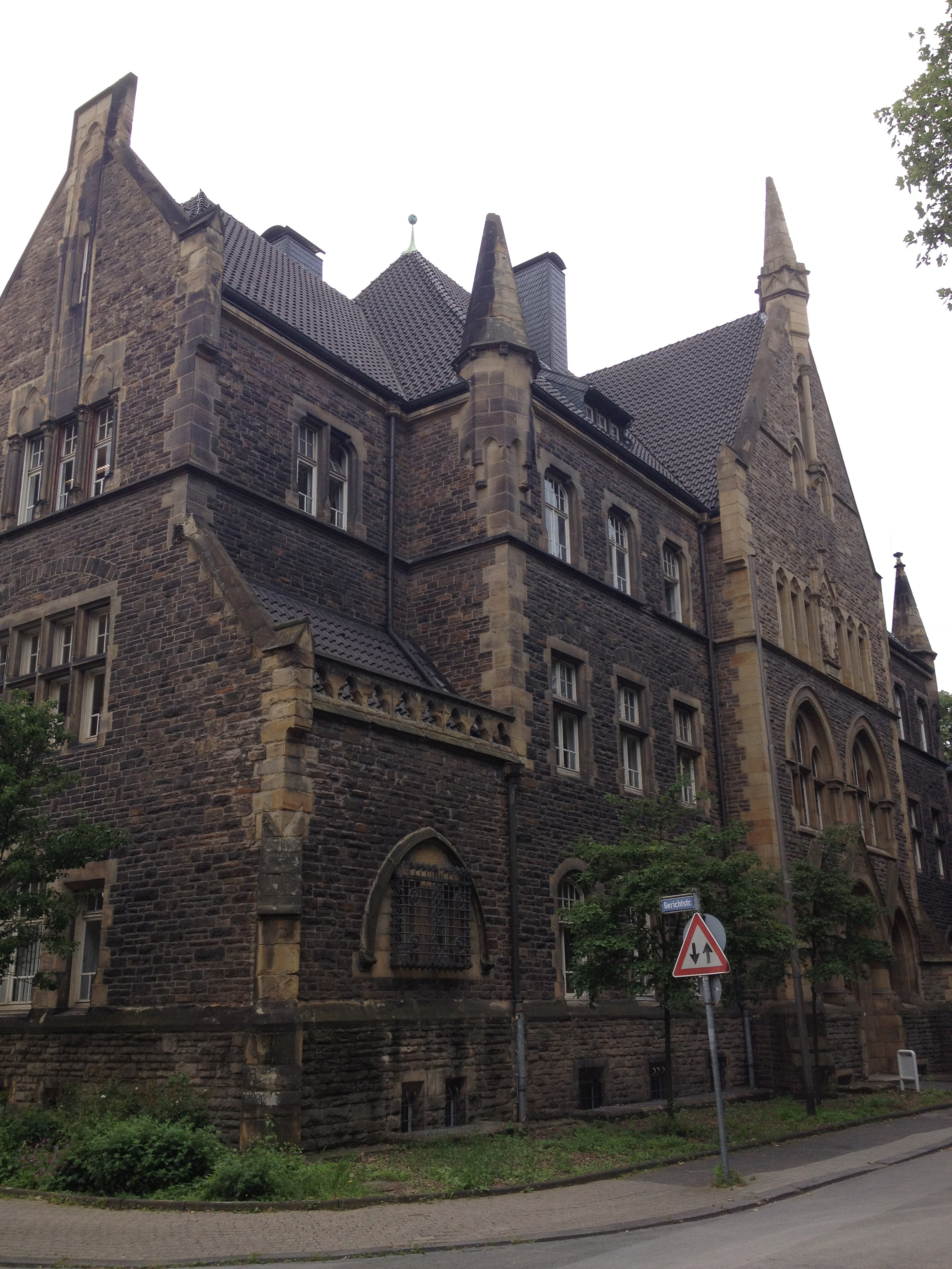 Amtsgericht in Mülheim an der Ruhr, Georgstraße 13, D-45468 Mülheim, Nordrhein-Westfalen, Deutschland